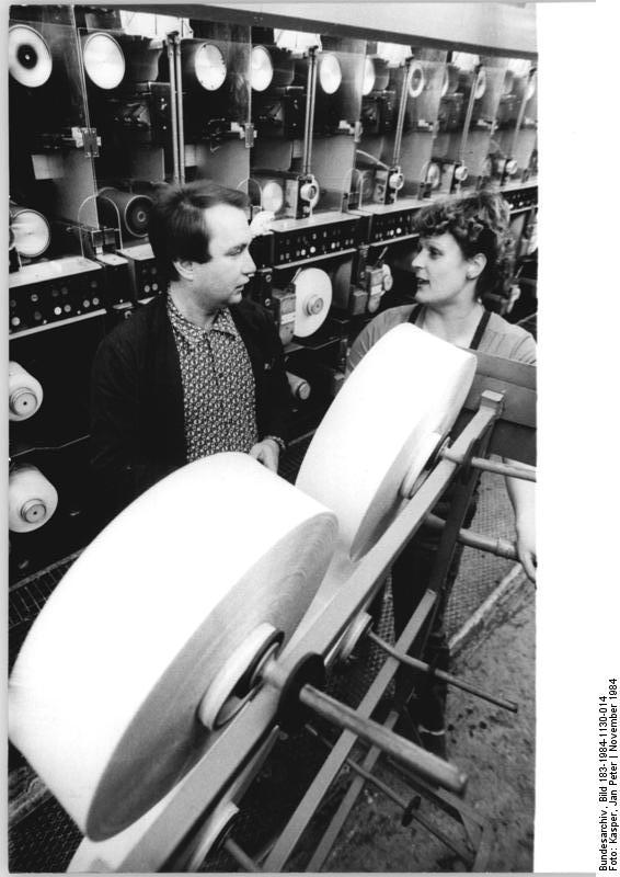 Chemiefaserkombinat Schwarza, Polyamidseidenproduktion ADN-ZB Kasper 30.11.84 Bezirk Gera: Gewerkschaftswahl-Zum zehntenmal wurde der Chemiefacharbeiter Rainer Krause in der Polyamidseidenproduktion im Stammbetrieb des Chemiefaserkombinates "Wilhelm Pieck" Schwarza von seinem Arbeitskollektiv als Vertrauensmann gewählt. Rainer Krause und die Wettbewerbsinitiatorin Ramona Scholtz (r.) sind Mitglieder der Jugendbrigade "Alfred Sobik", die sich gegenwärtig auf die Inbetriebnahme zweier weiterer Schnellspinnstraßen in der Polyamidseidenproduktion noch in diesem Jahr vorbereitet.